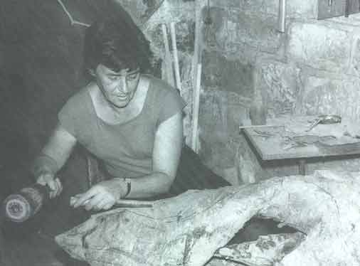 נעמי בעת עבודתה